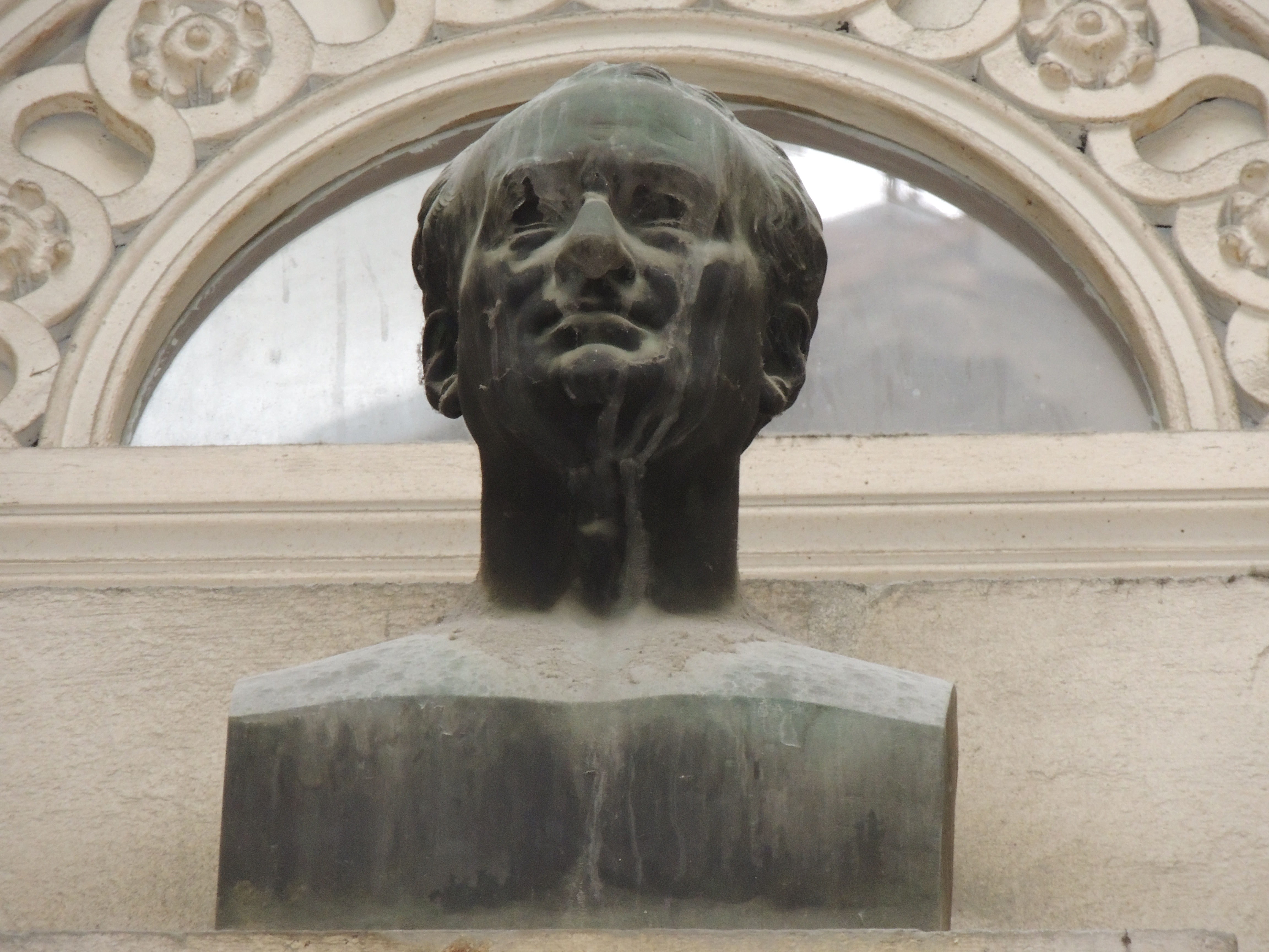 Passage Pommeraye, Nantes, France. Buste de Jean-Baptiste Ceineray, dans la galerie Santeuil, œuvre de Jean-Baptiste Joseph Debay (1802-1862).